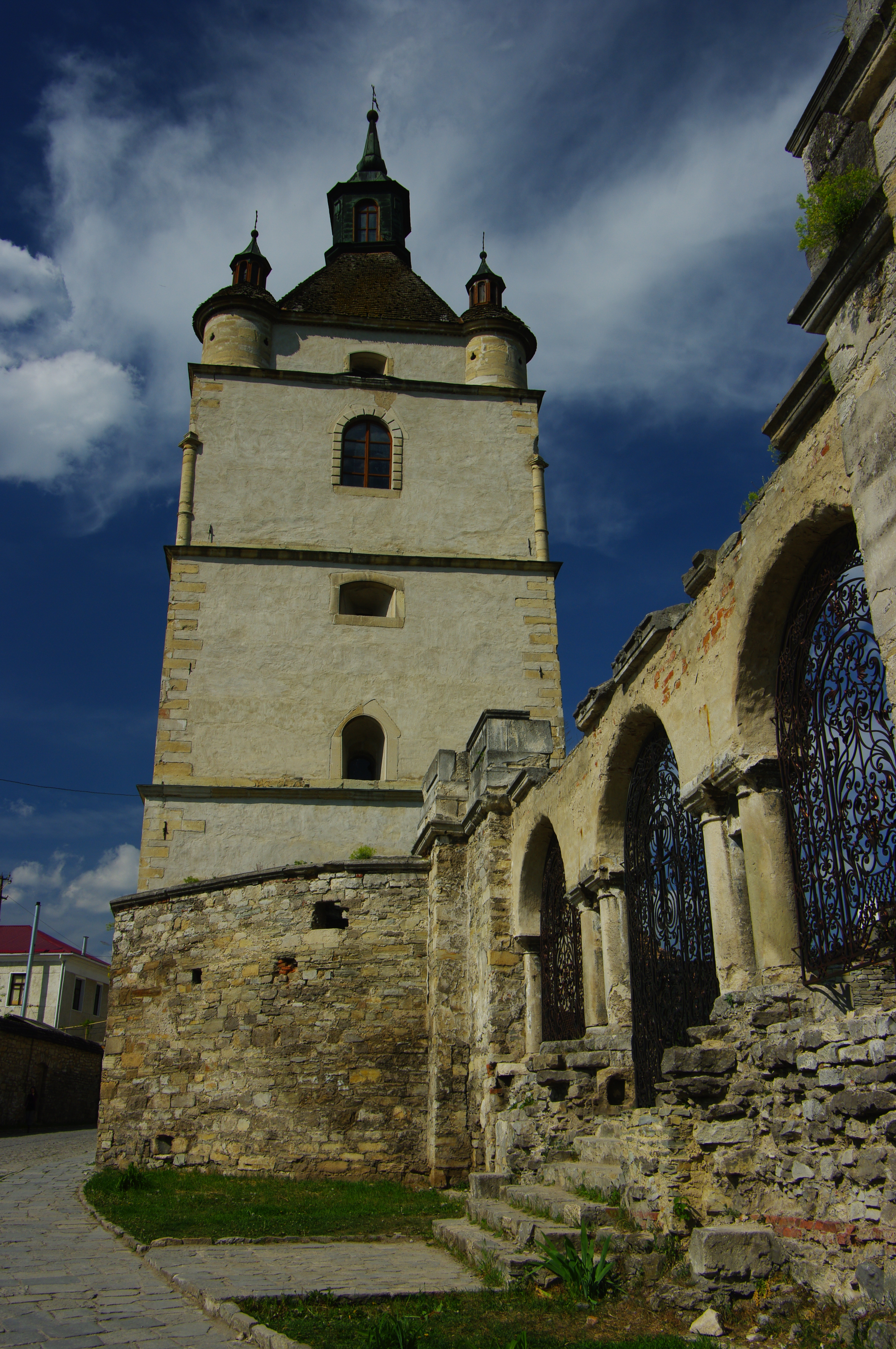 Комплекс вірменського костелу, Кам'янець-Подільський, вул.Вiрменська, 1